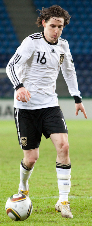 Sebastian Rudy im U-21-Länderspiel Deutschland gegen Island.